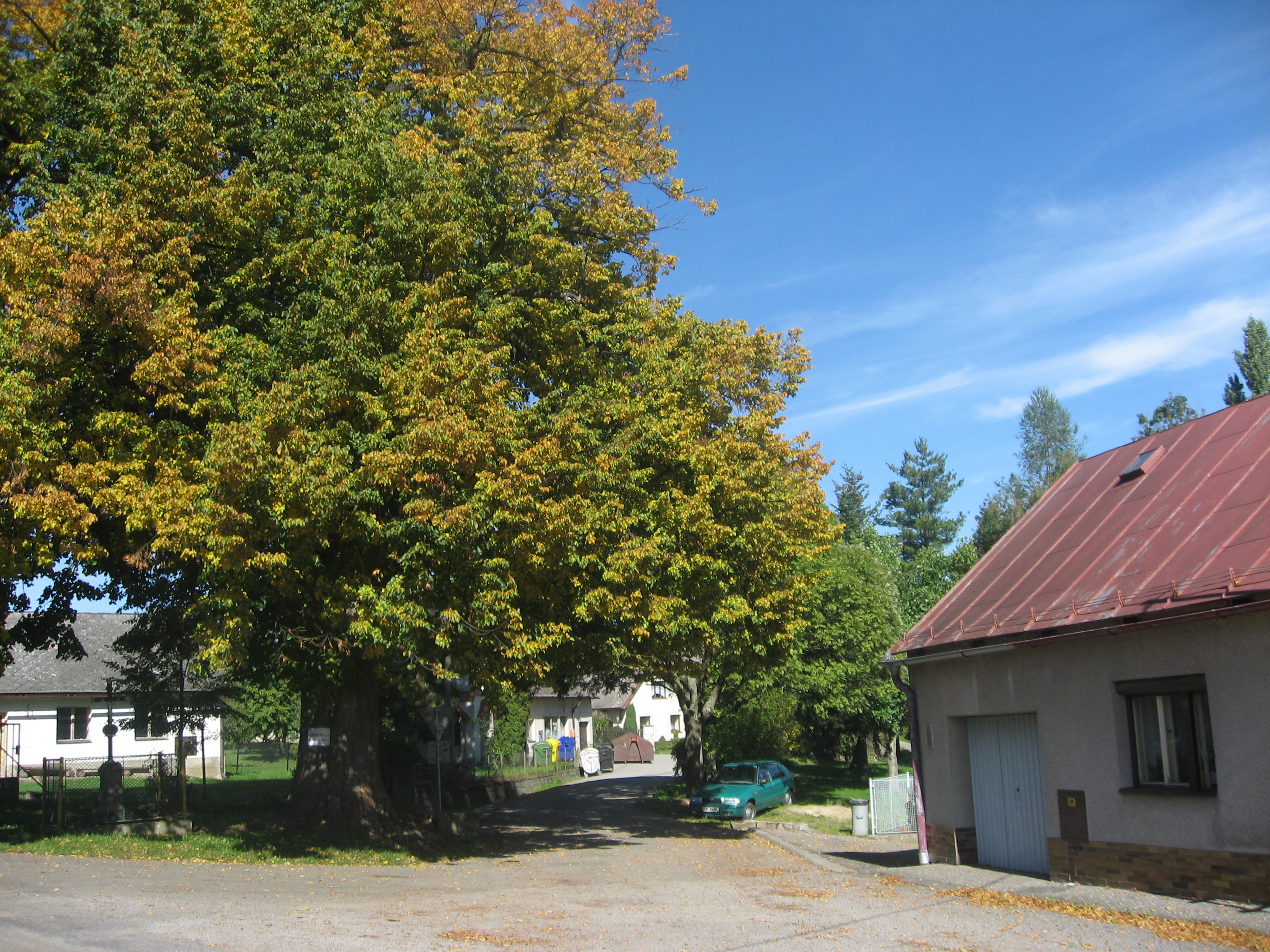 Ves Leština, součást obce Věž